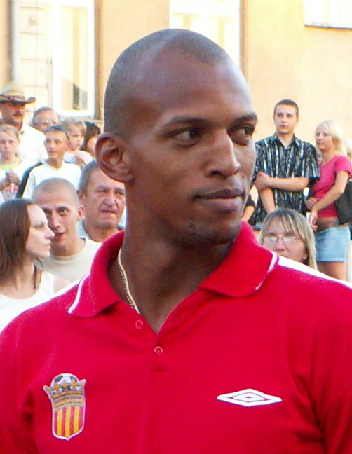 Hernani - Korona Kielce player